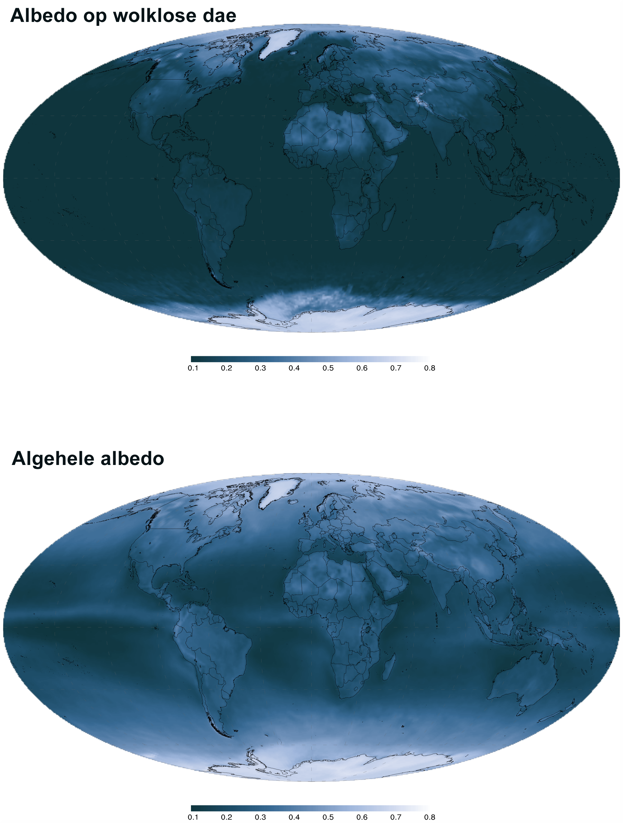 Die Aarde se albedo op 'n wolklose dag teen die algemene albedo